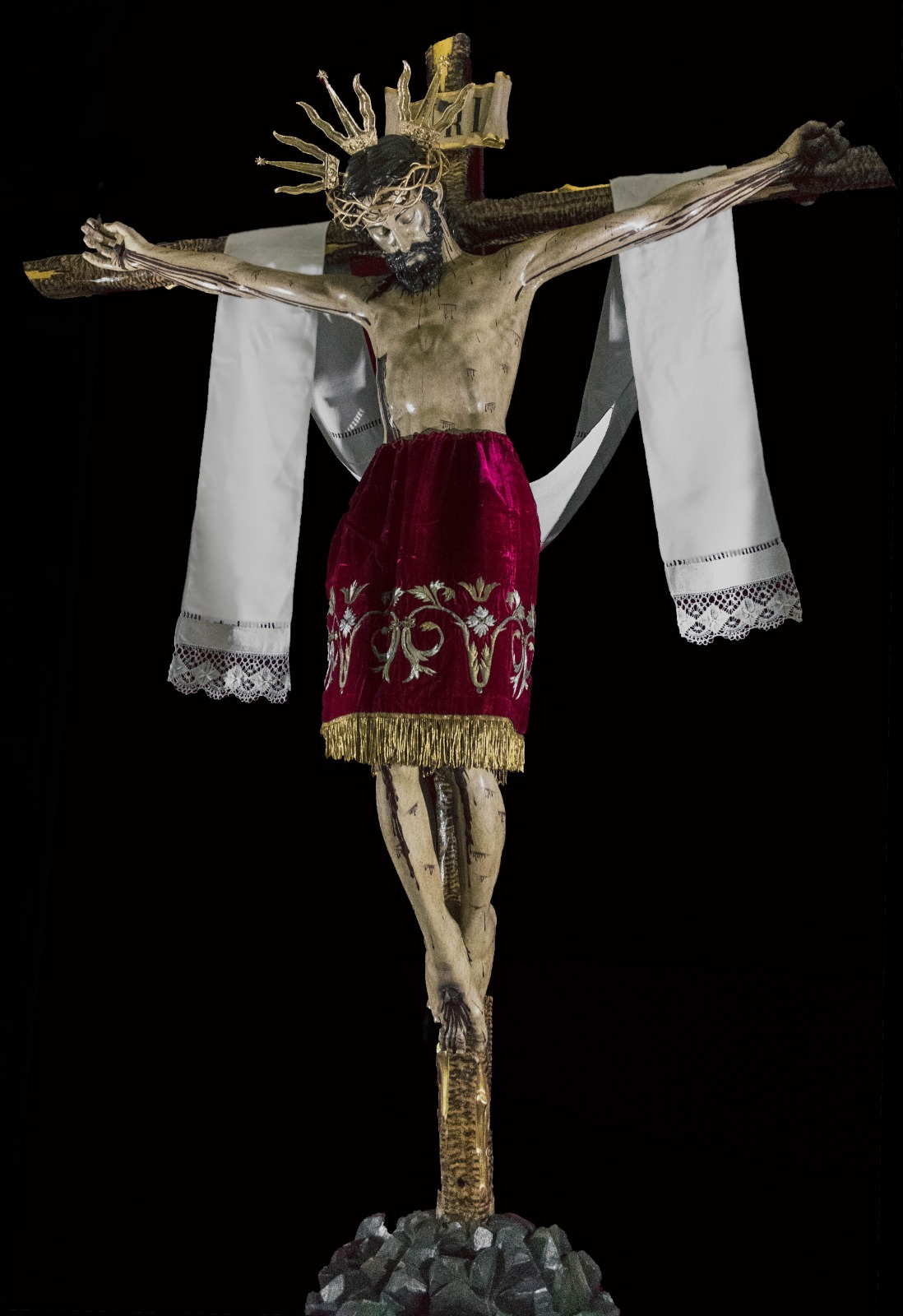 Señor de los Reyes- Aceuchal